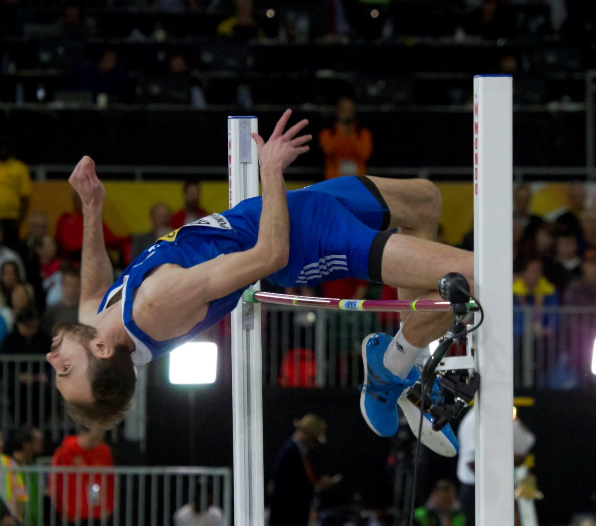 507 baniotis